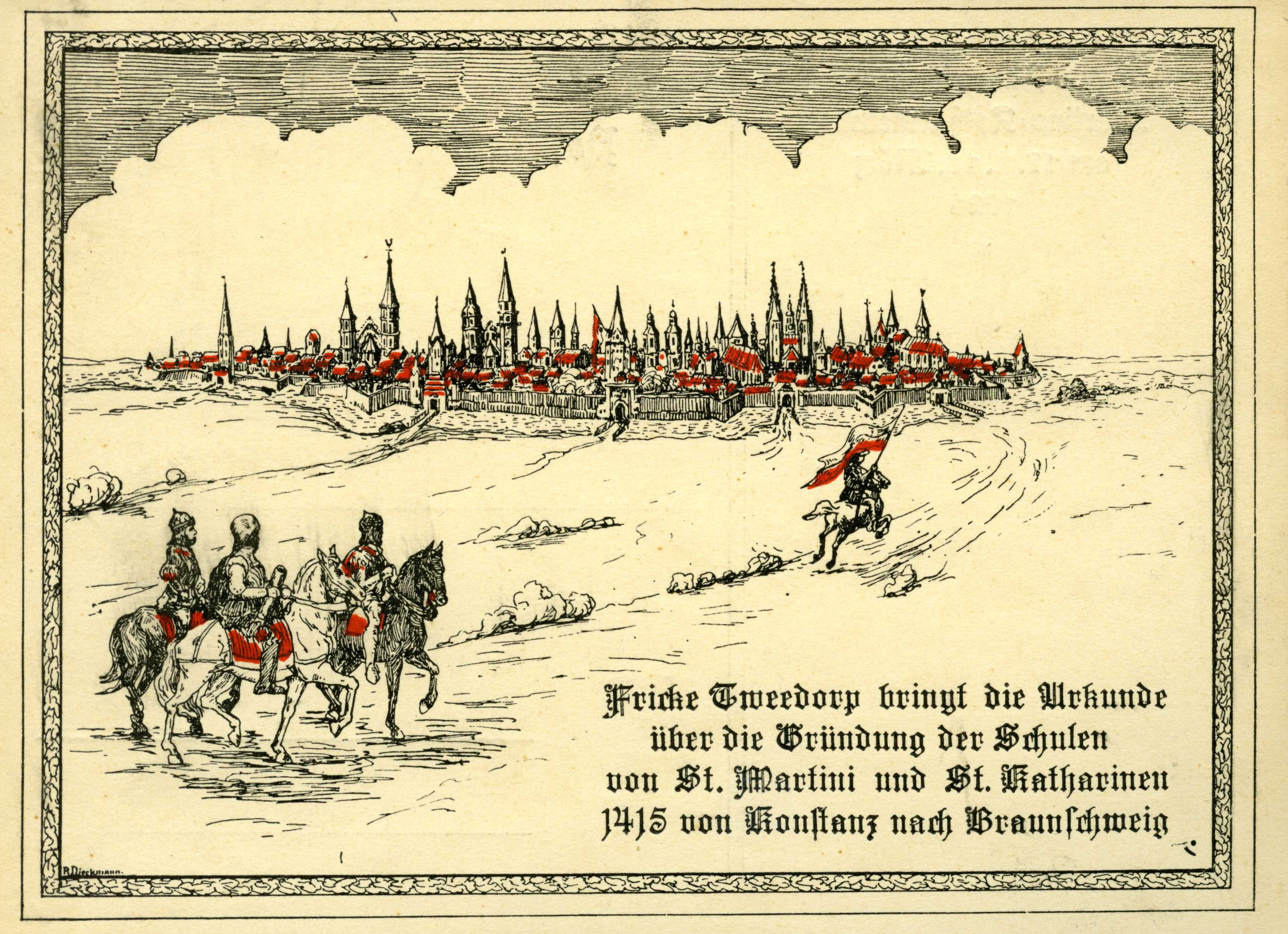 Braunschweig, 1415: Fricke Tweedorp überbringt die Gründungsurkunde der Stadtschulen von Papst Johannes XXIII nach Braunschweig. Ansichtskarte von vor 1930. Postkarte, herausgegeben vom Martino-Katharineum anlässlich der 500-Jahrfeier der Schule am 17. und 18. März 1926.